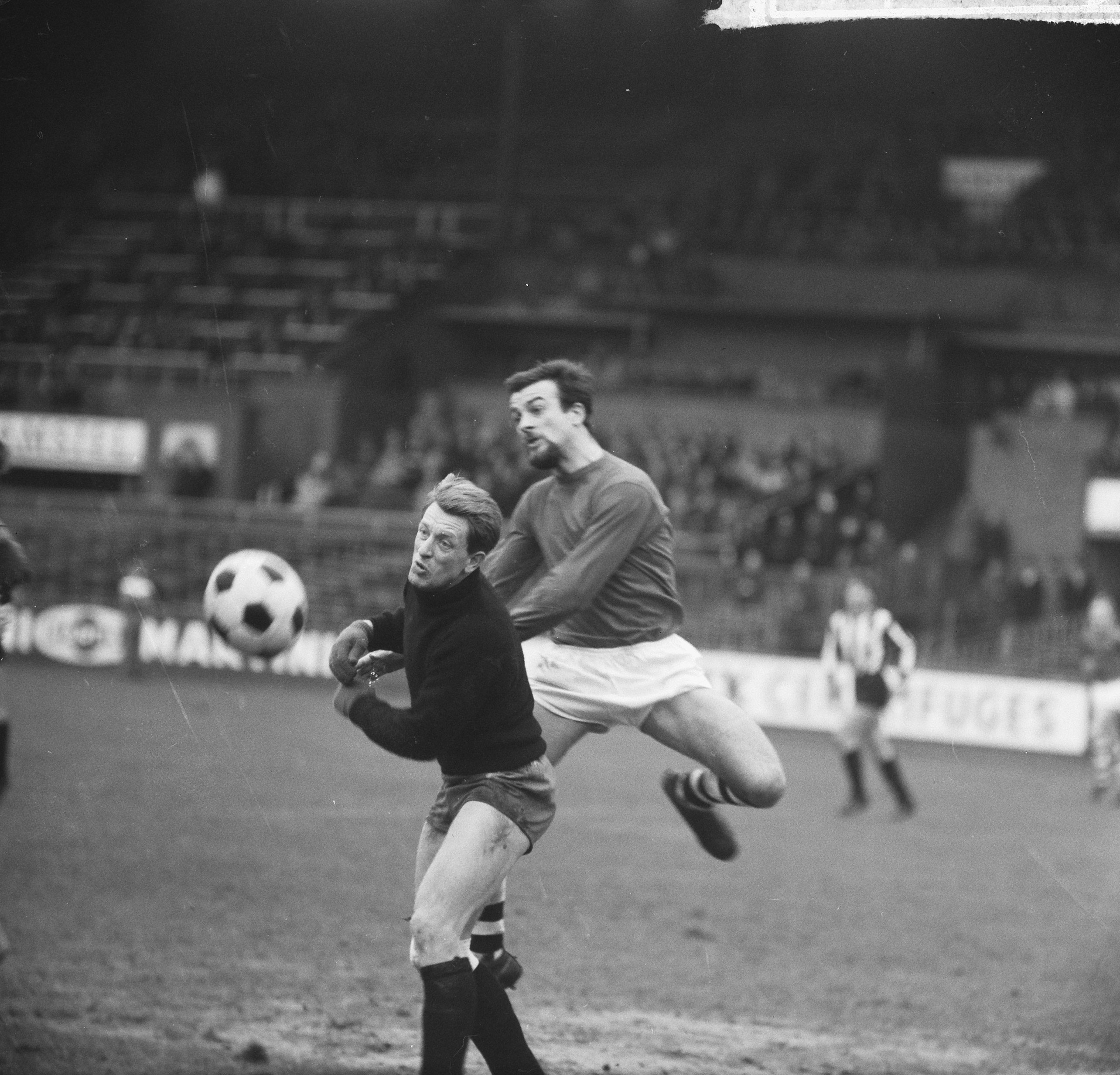 Collectie / Archief : Fotocollectie Anefo Reportage / Serie : [ onbekend ] Beschrijving : Bekervoetbal Blauw-Wit tegen Heracles 4-2, Slisser (Blauww kopt in, keeper Hentenaar grijpt mis Datum : 6 december 1964 Trefwoorden : sport, voetbal Persoonsnaam : Heracles Instellingsnaam : Blauw-wit Fotograaf : Nijs, Jac. de / Anefo Auteursrechthebbende : Nationaal Archief Materiaalsoort : Negatief (zwart/wit) Nummer archiefinventaris : bekijk toegang 2.24.01.03 Bestanddeelnummer : 917-2103